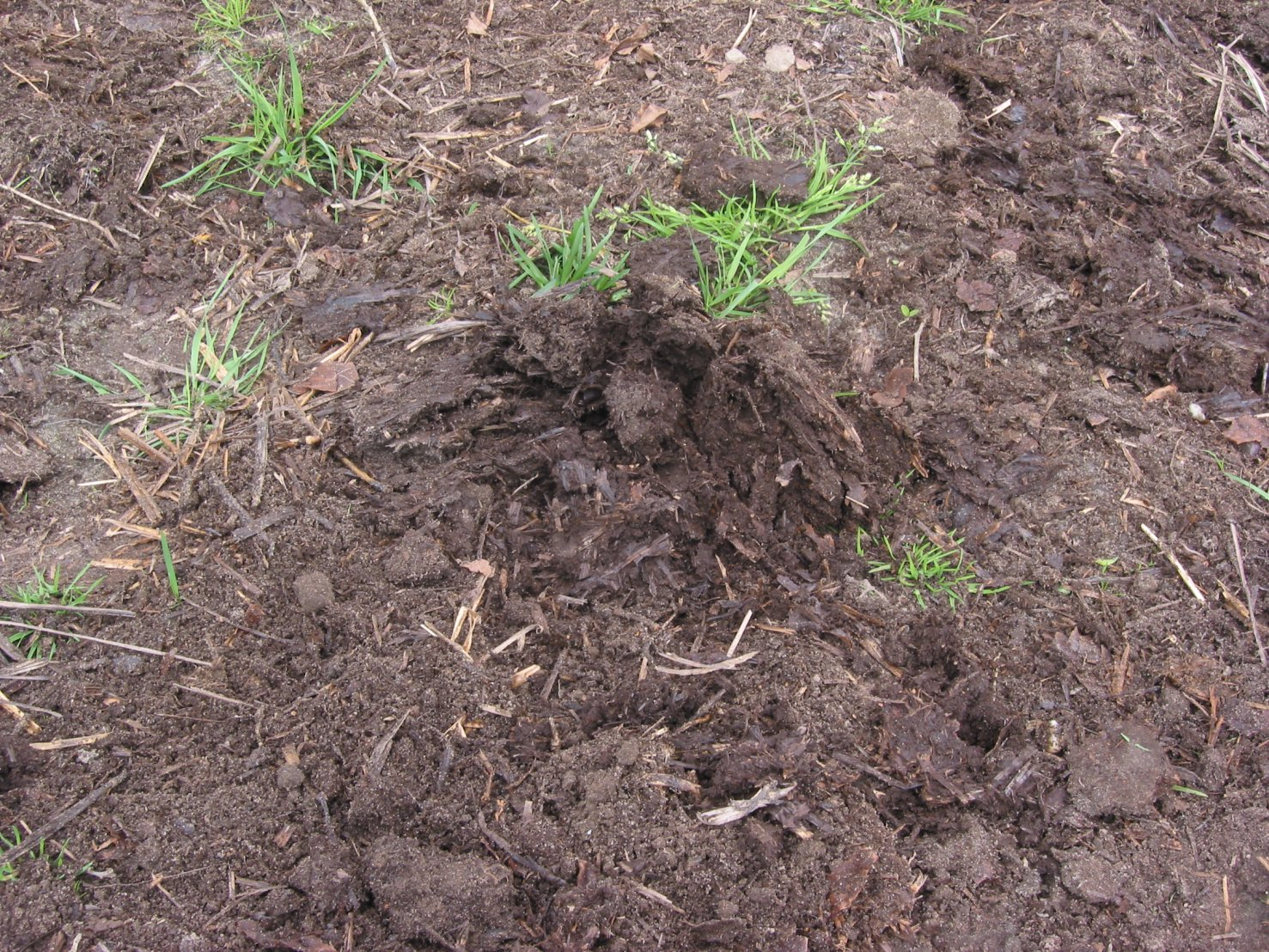 Horse manure one year old spread on garden soil (Paardenmest 1 jaar oud op tuingrond)